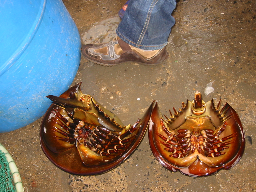 Onderkant van de degenkrab. Gezien op markt in Noord Vietnam (Cat Bá)